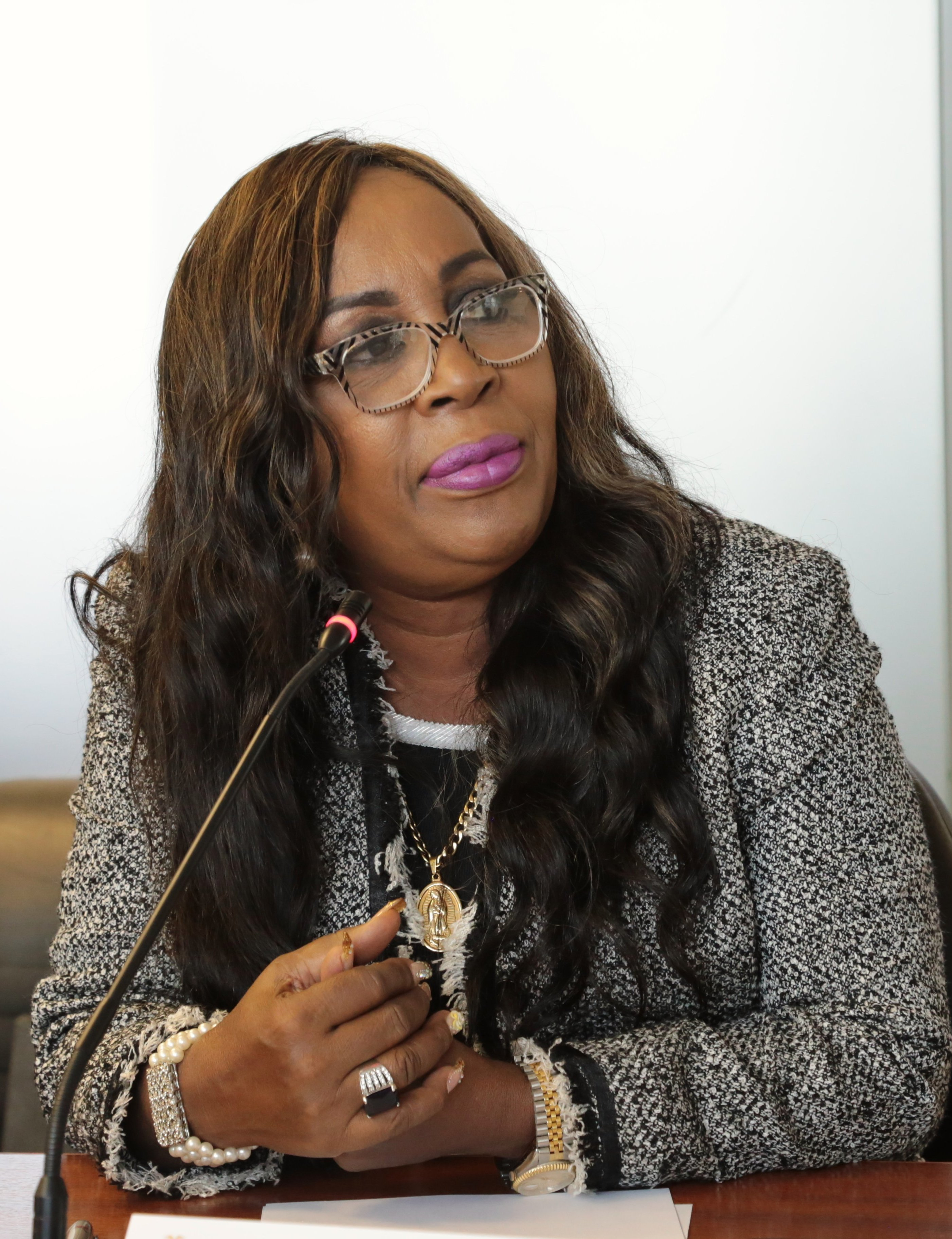 TEMA: 1. Análisis del proyecto de Ley para la Aprobación y Extinción de Personas Jurídicas de Derecho Privado con Finalidad Social y Sin Fines de Lucro. 2. Análisis del proyecto de Código Orgánico del Sistema de Participación Ciudadana y Control Social. Fotografías: Luis Pinto/Asamblea Nacional 13 de marzo de 2018 - Comisión de Participación Ciudadana TEMA: 1. Análisis del proyecto de Ley para la Aprobación y Extinción de Personas Jurídicas de Derecho Privado con Finalidad Social y Sin Fines de Lucro. 2. Análisis del proyecto de Código Orgánico del Sistema de Participación Ciudadana y Control Social. Fotografías: Luis Pinto/Asamblea Nacional